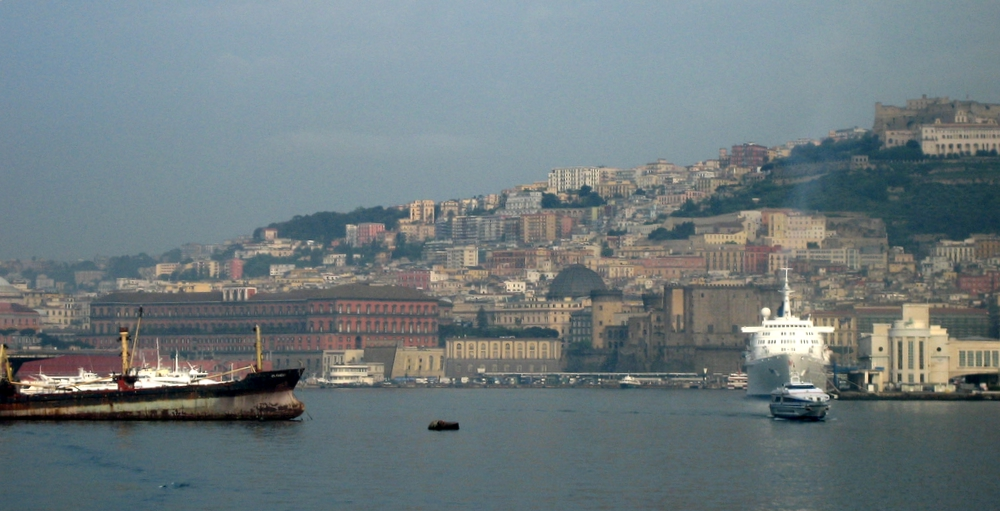 Porto, Napoli, ItaliaIMG_0457